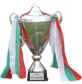 Снимката е модифицирата от оригиналната използва се с разрешение от авторите. Купа на България за сезон 2005/06